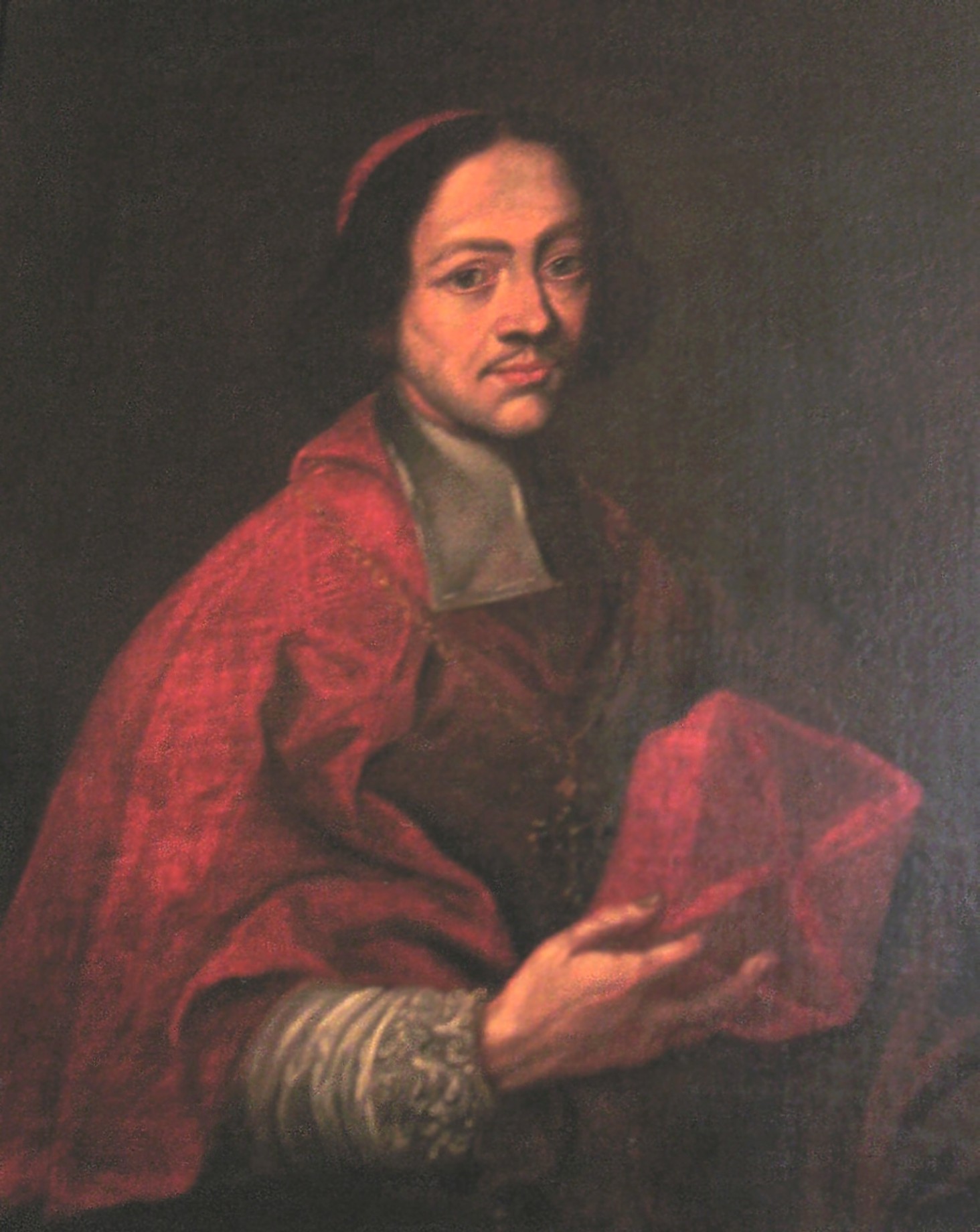 Portrait of Jan Kazimierz Denhoff (1649-1697)